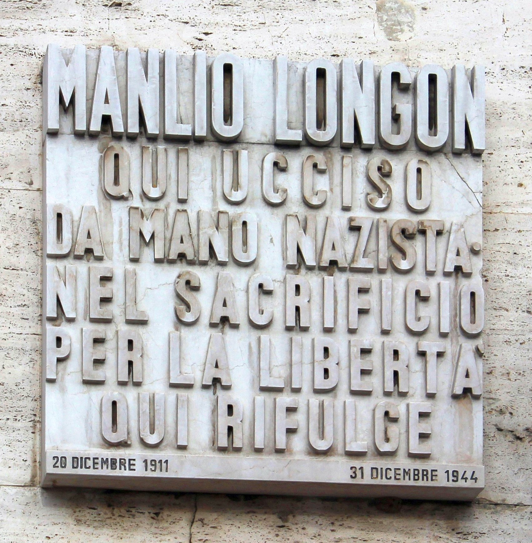 Gedenkstein für Manlio Longon